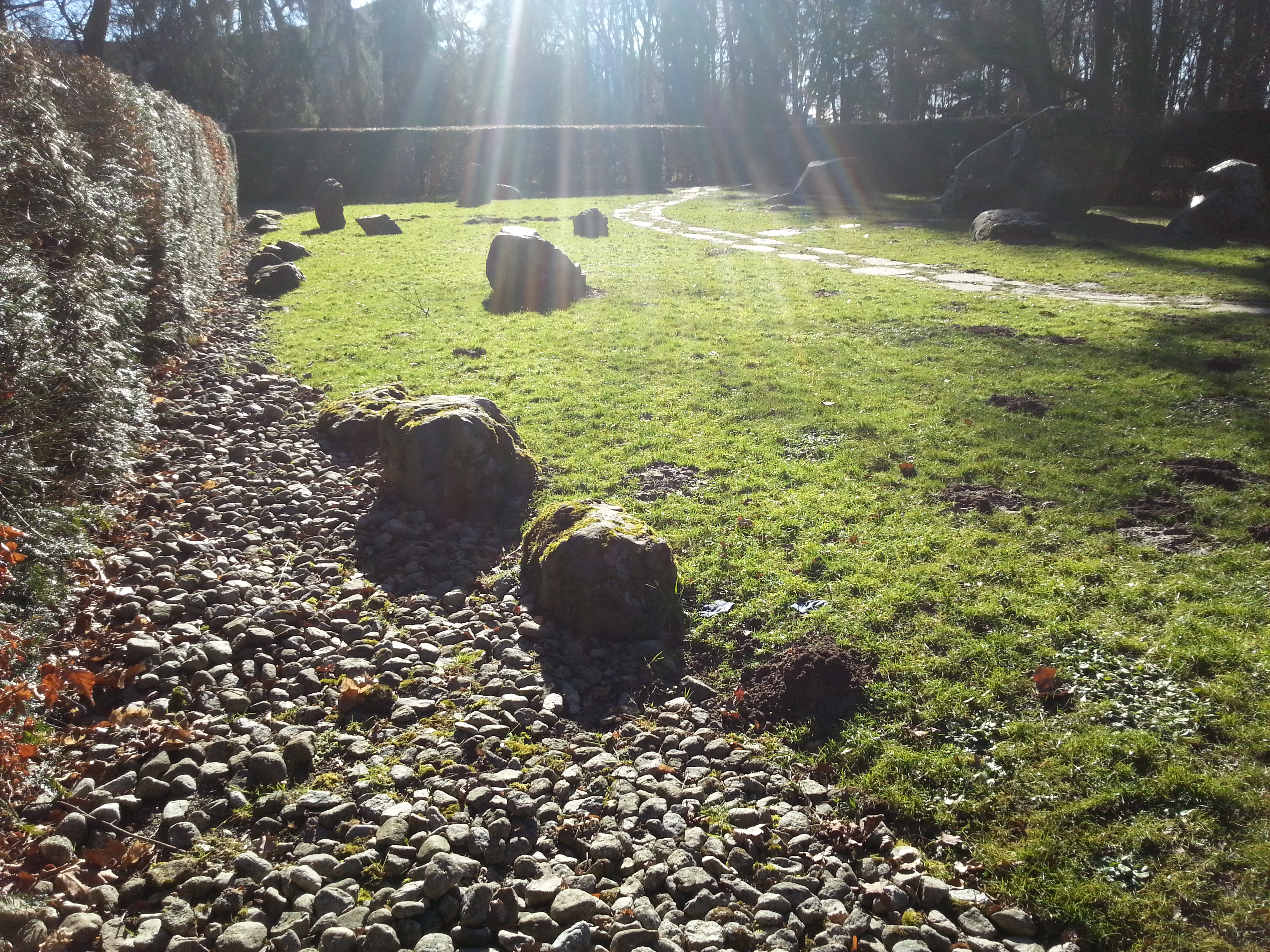 Japanischer Steingarten im Wittelsbacher Park Augsburg, Bayern